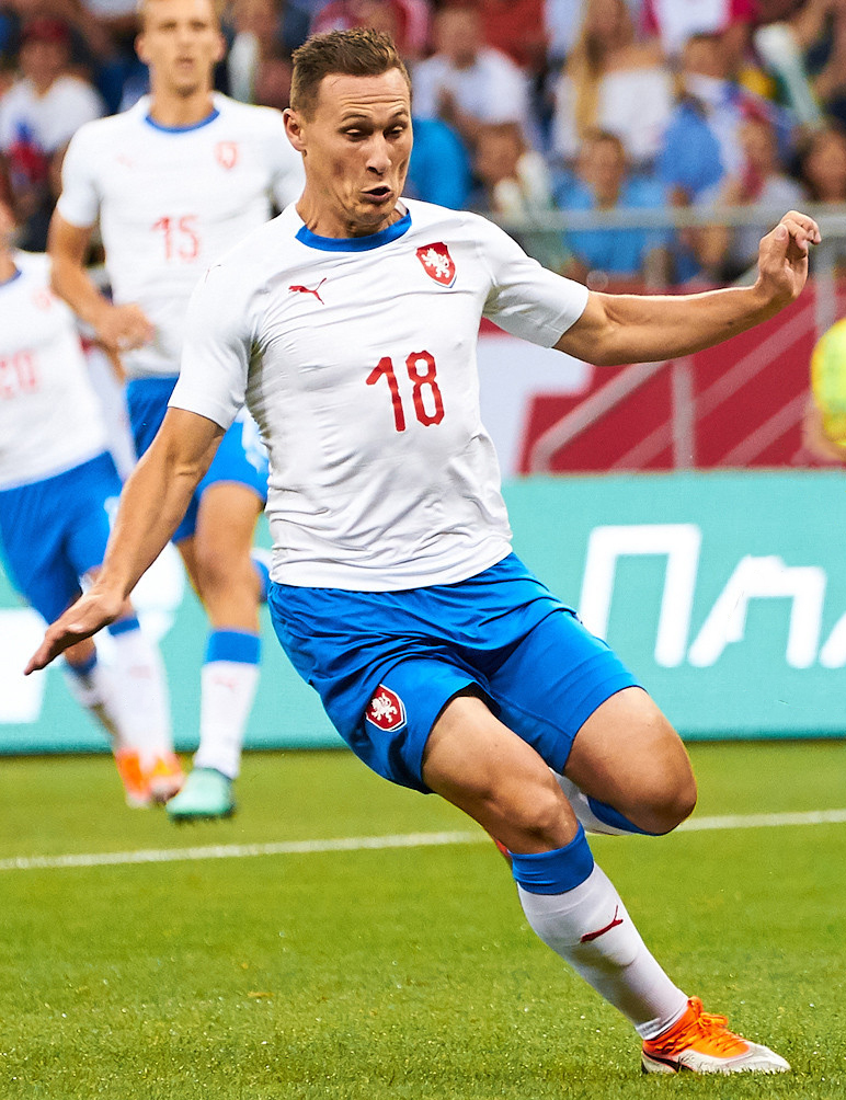 Сборная России в Ростове не оставила и следа от команды Чехии